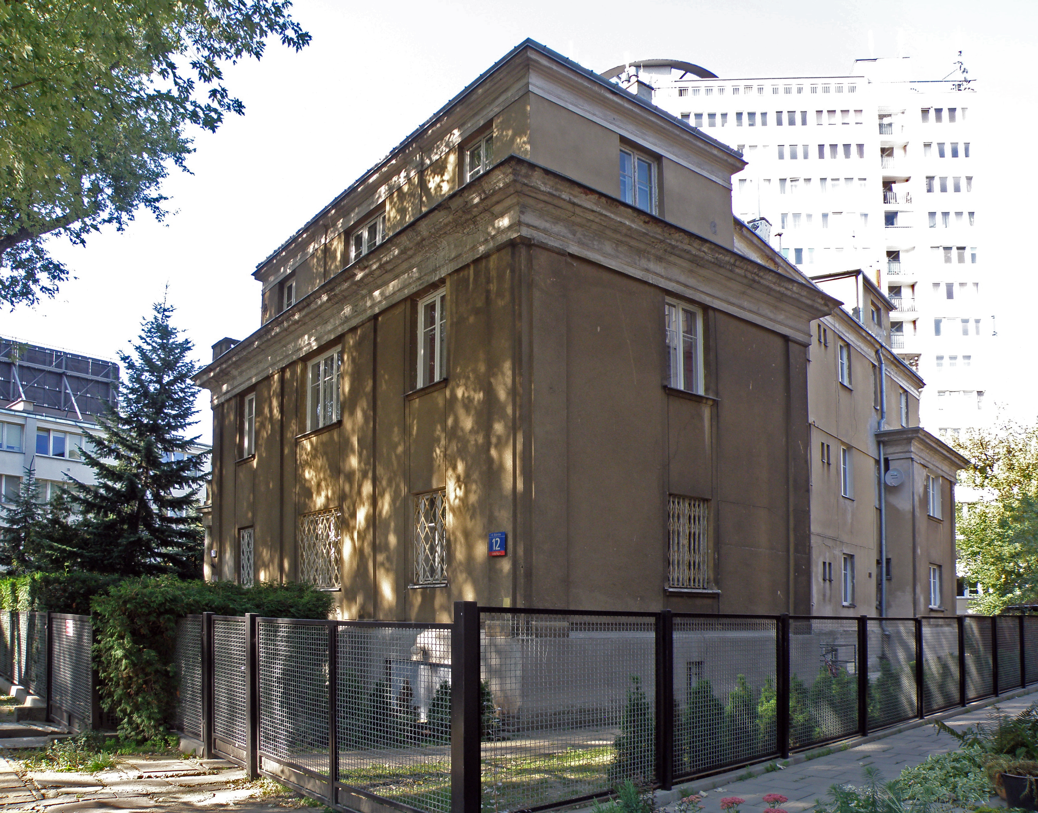 Dom, ok. 1930 (973 A z 13.06.1979) ul. Elsterska 12, Warszawa.